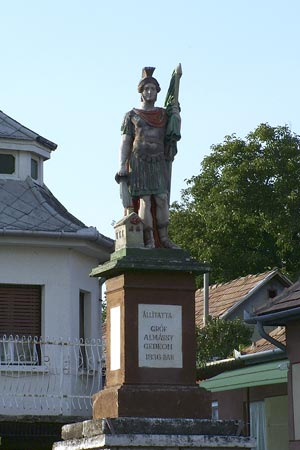 Nagybárkányi Szent Flórián szobor